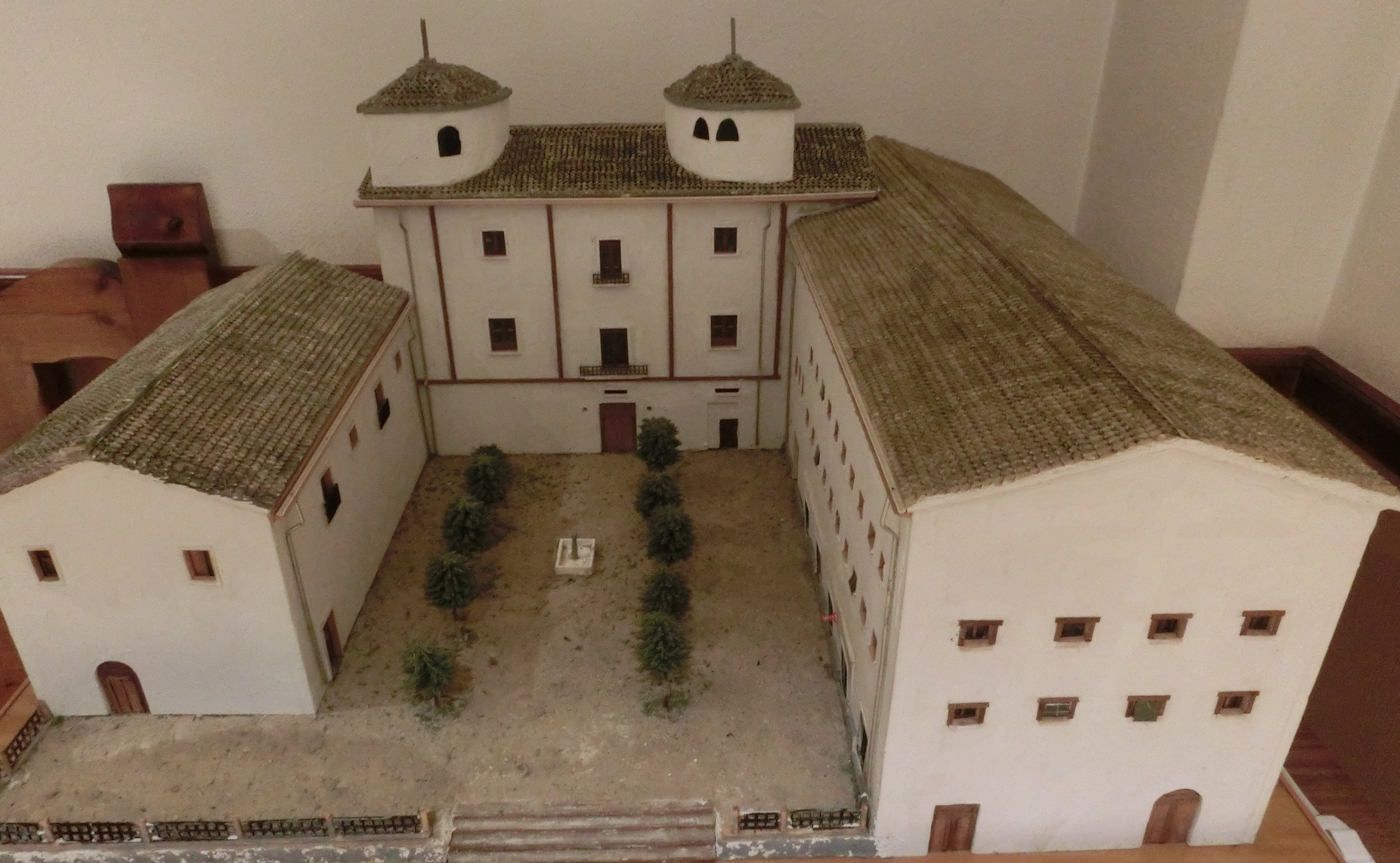 Plastico degli edifici del municipio (di fronte) e del collegio degli scolopi di Barbastro (a destra), com'erano nel 1936, durante la guerra civile spagnola. La riproduzione è visibile nel museo dei martiri clarettiani a Barbastro, (Huesca) in Spagna.